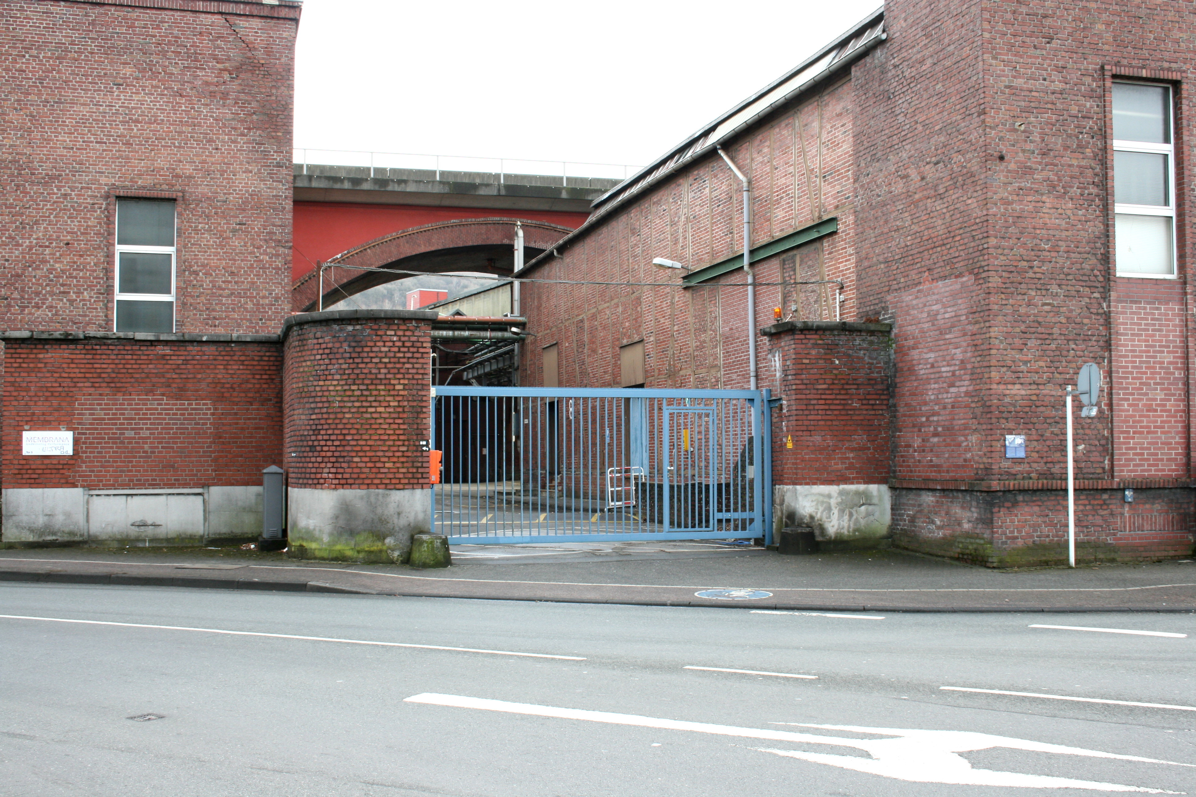 J.P. Bemberg AG in Wuppertal